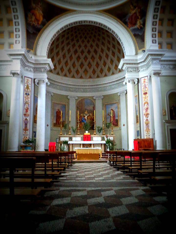 Interno dell'edificio